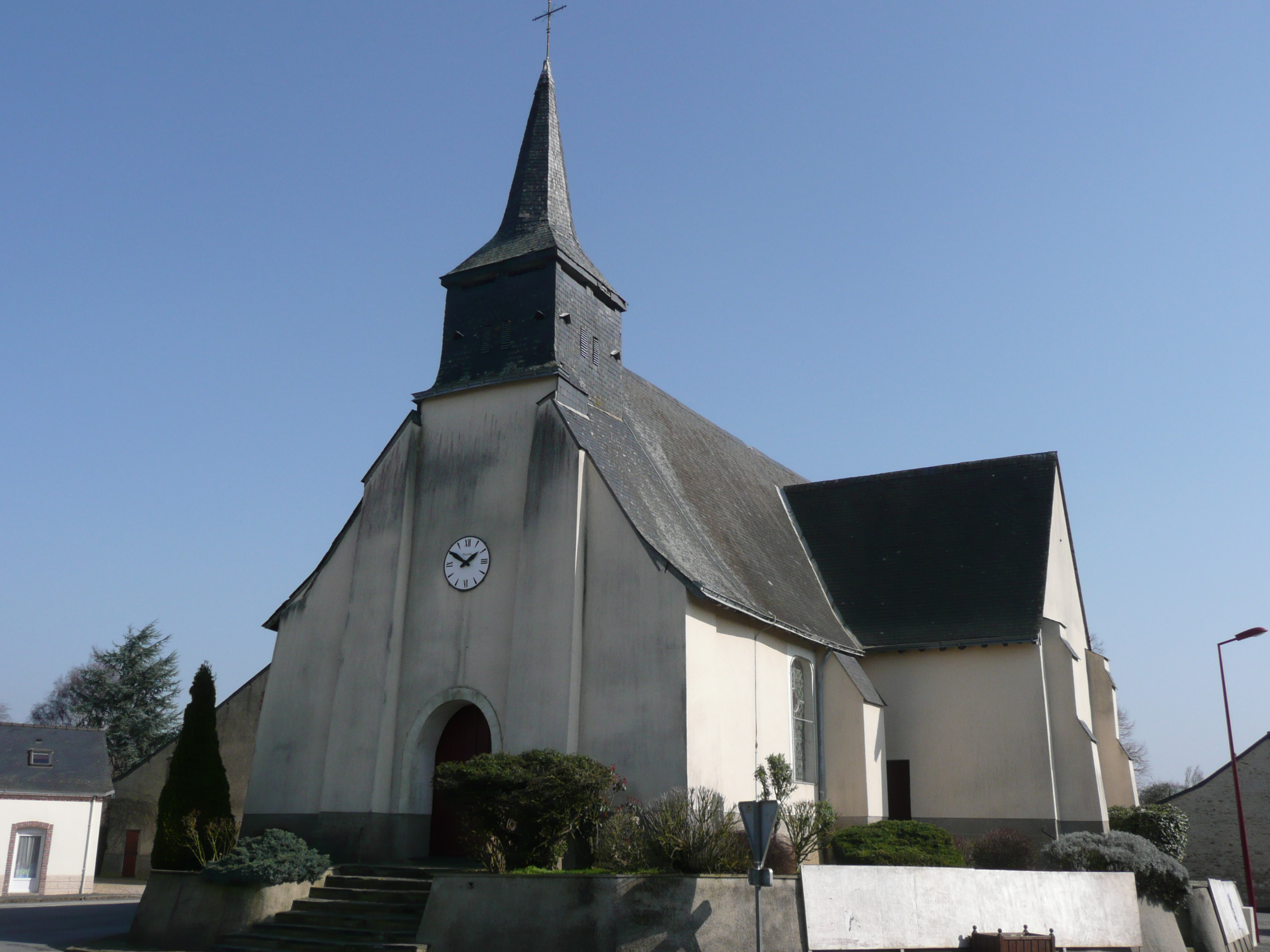 Eglise de La Chapelle-Hullin